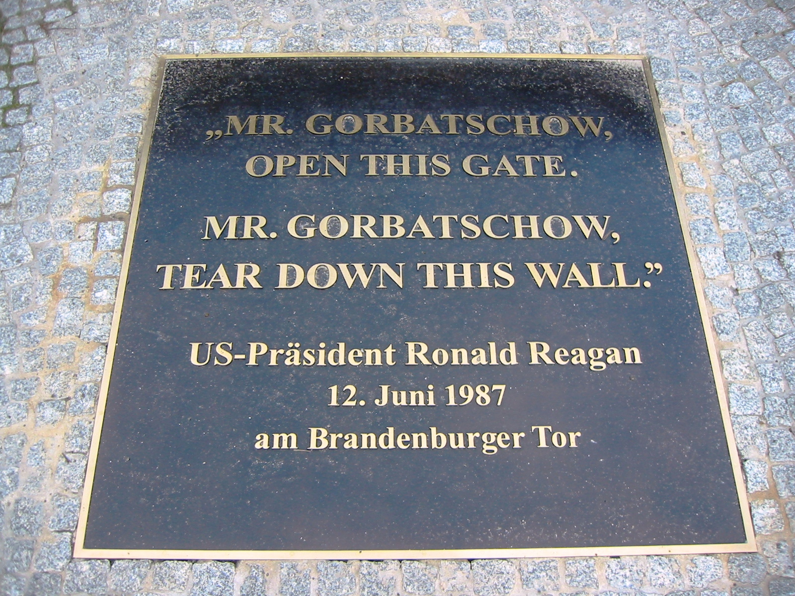 Gedenktafel für Ronald Reagan und seinen berühtmten Satz: „Mr. Gorbatschow, open this gate. Mr. Gorbatschow, tear down this wall.“. Die Tafel wurde am 12. Juni 2012 im Beisein von Hans-Dietrich Genscher enthüllt und befindet sich links neben dem Kunstwerk "Balaceakt".